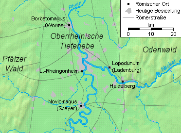 Der Rhein-Neckar-Raum in römsicher Zeit